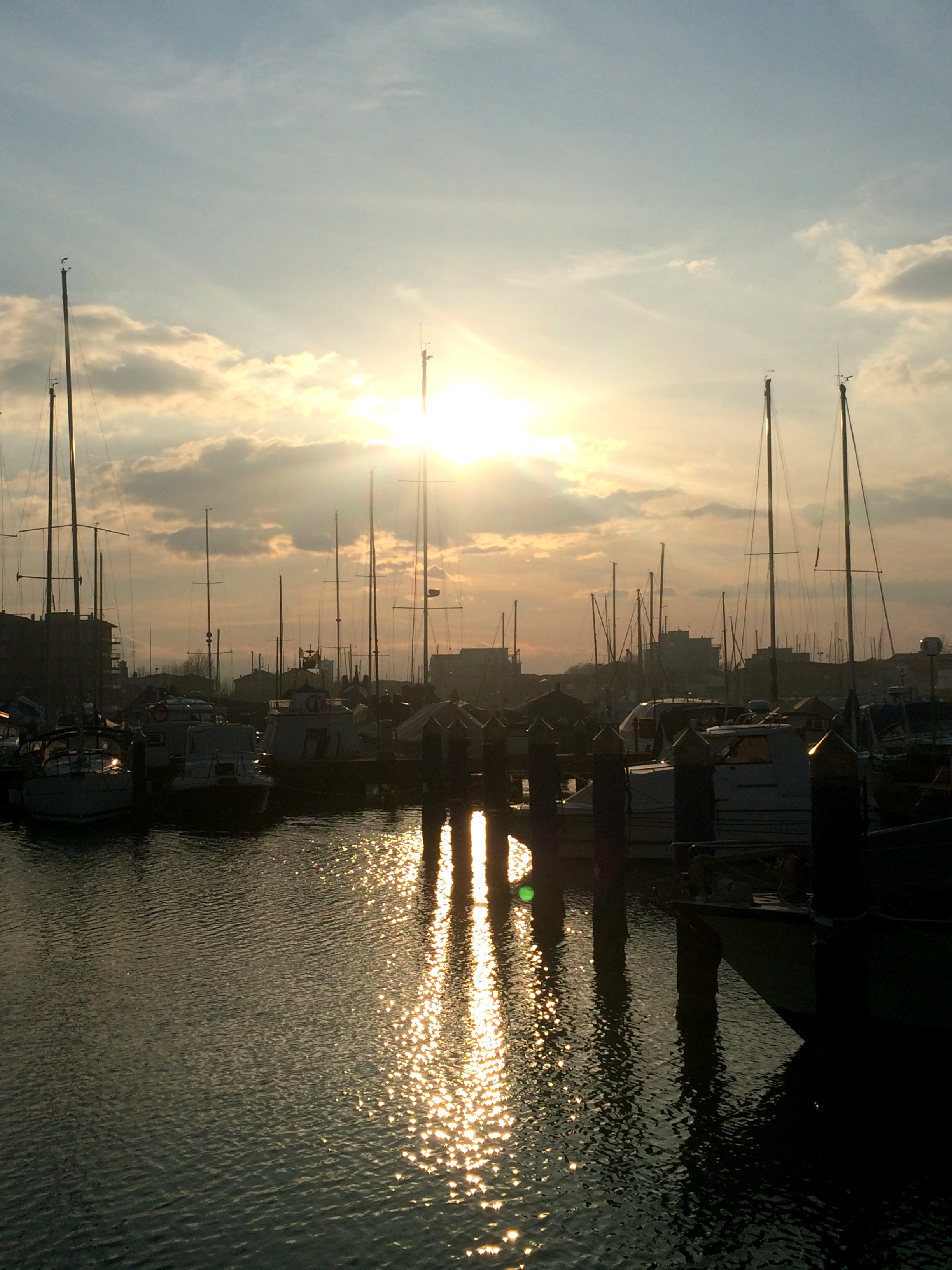 Porto di Cervia al tramonto